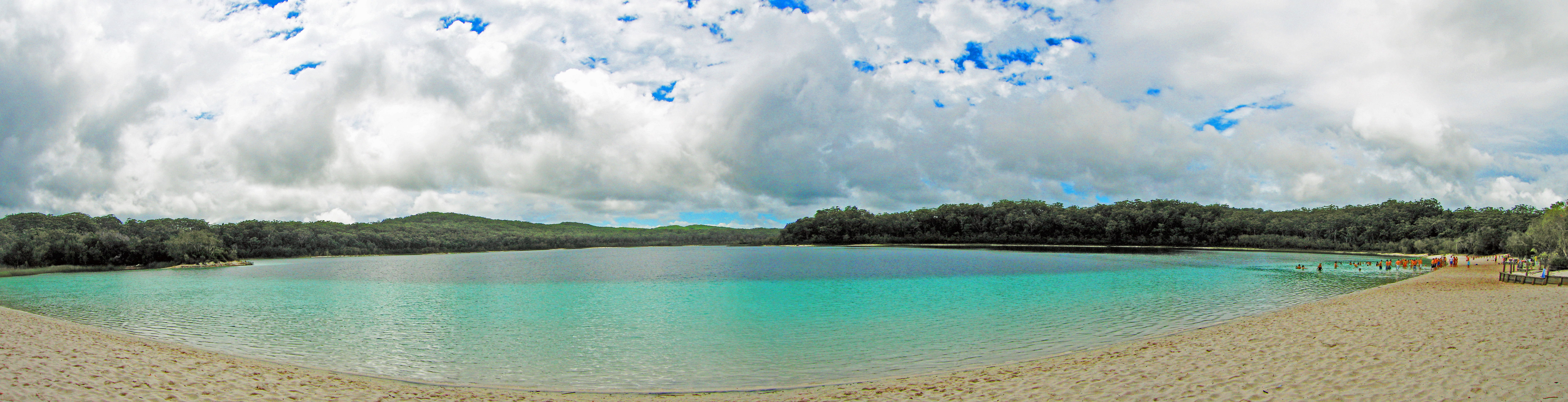 Fraser Island Lake